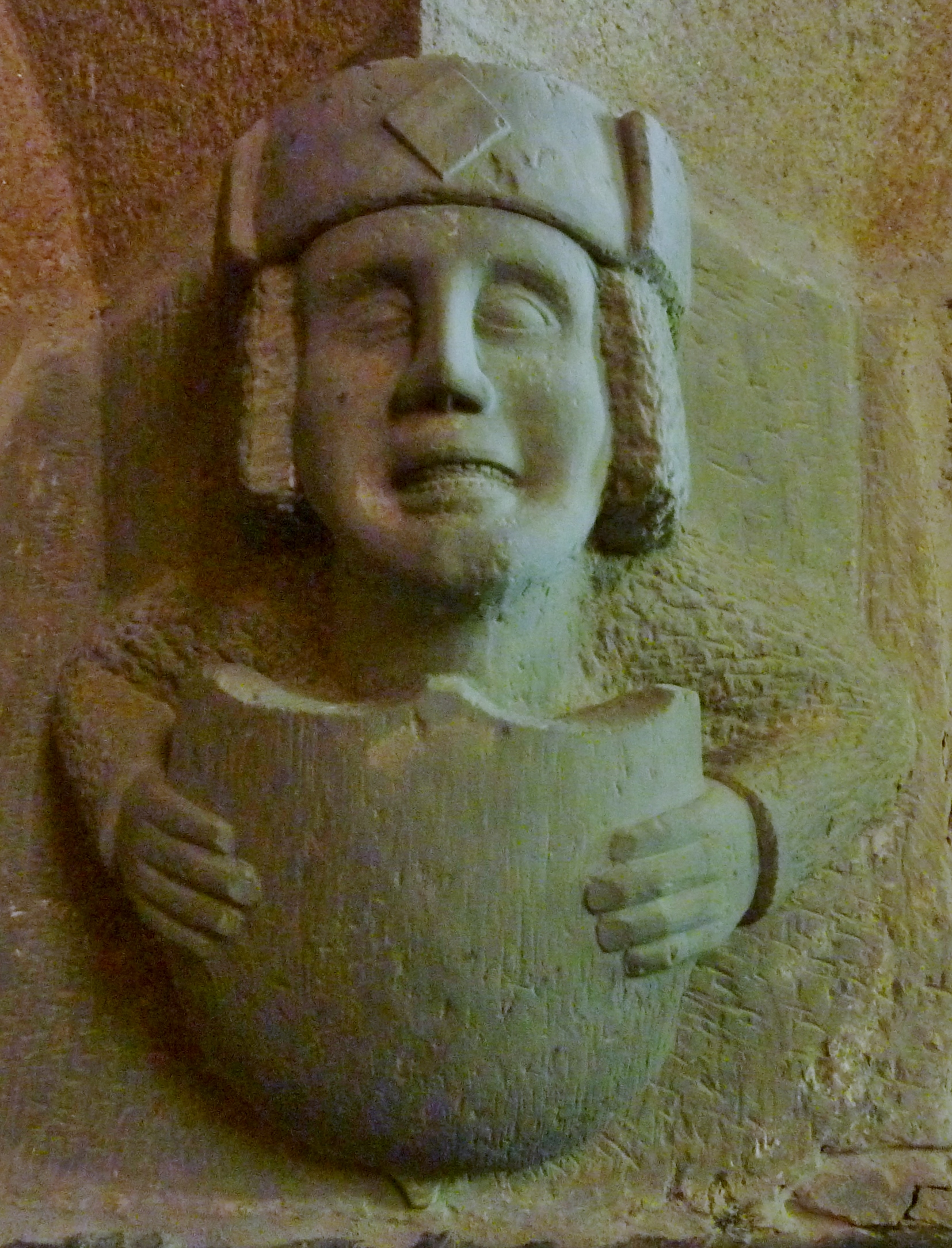 Châteauneuf-du-Faou : chapelle Saint-Ruelin du Moustoir, représentation d'un fief de haubert (côte de maille prolongée par un collet, une coiffe, des manches, des mitons et des chausses). Le possesseur d'un fief de haubert, ici celui de la seigneurie de Rosily, servait le roi ou le duc en Bretagne.